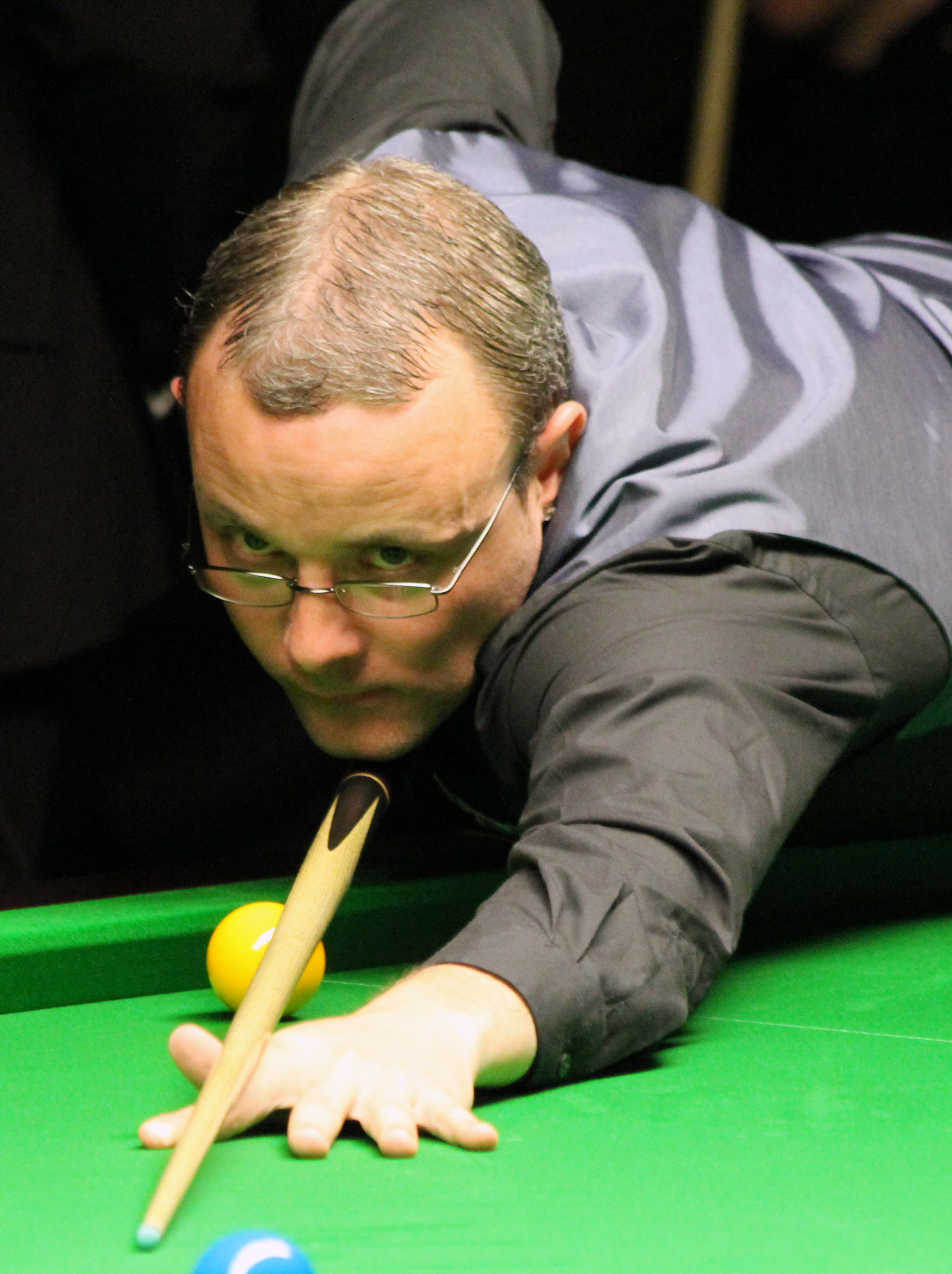 Martin Gould beim Paul Hunter Classic 2012